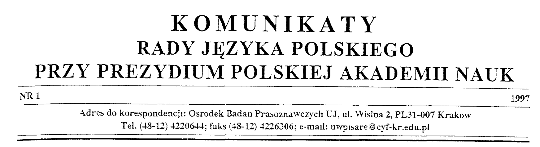 Winieta pierwszego numeru Komunikatów Rady Języka Polskiego (nr 1 z 1997 r.); Źródło = Komunikaty udostępnione w Internecie przez Radę Języka Polskiego, aktualnie pod adresem